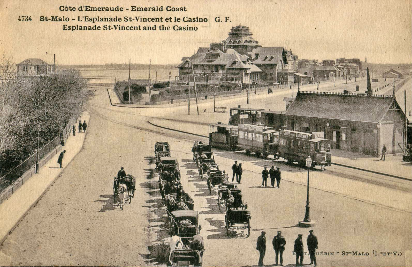 Carte postale ancienne éditée par Guérin à Saint-Malo / GF , n°4734 Côte d'émeraude - SAINT-MALO - L'esplanade Saint-Vincent et le Casino